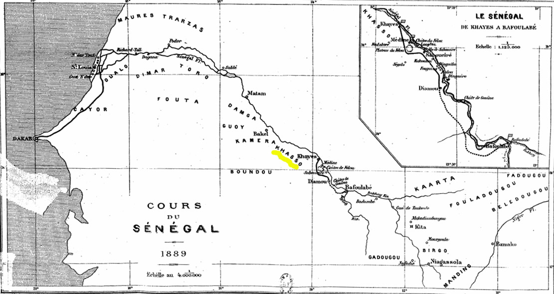 Localisation du Khasso sur une carte du fleuve Sénégal (1889) dans Eugène Béchet, Cinq Ans de séjour au Soudan français, E. Plon, Nourrit, Paris, 1889, après la page 270